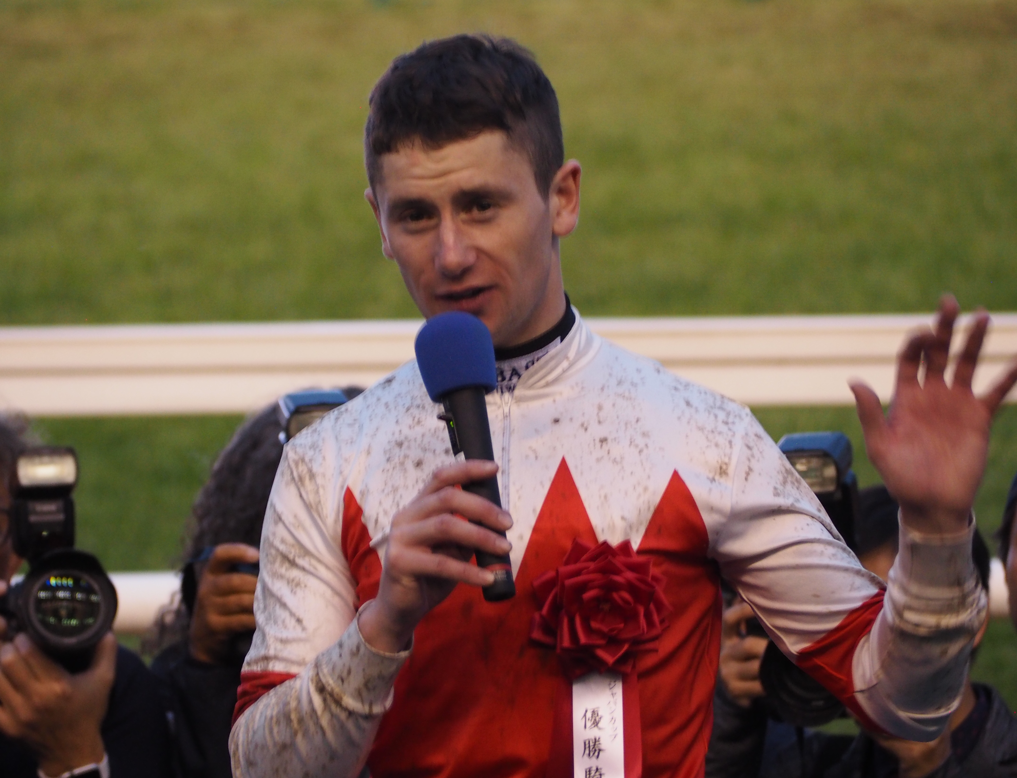 2019ジャパンカップ オイシン・マーフィー騎手のレース後のインタビュー